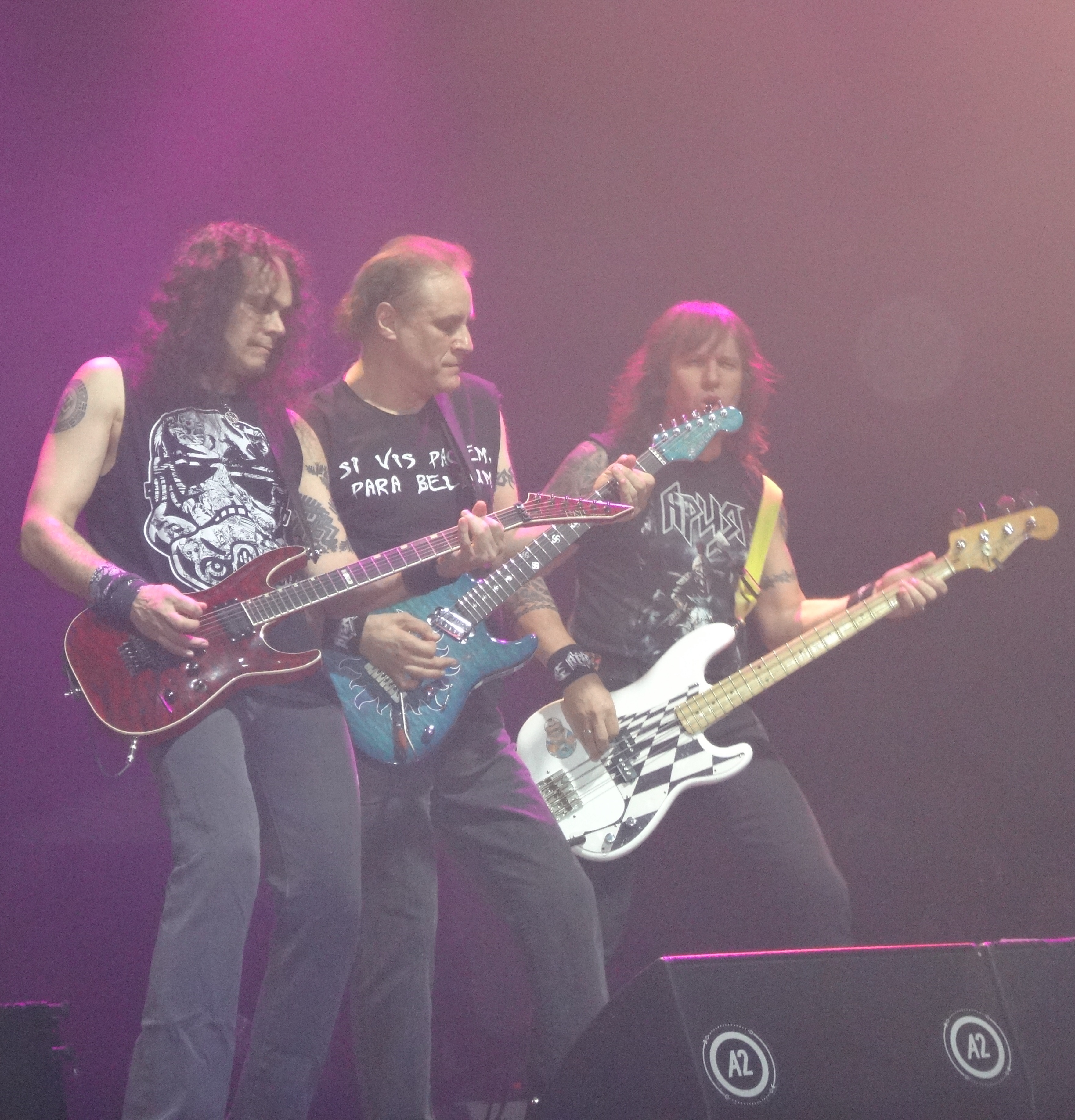 Попов, Холстинин и Дубинин, группа "Ария"